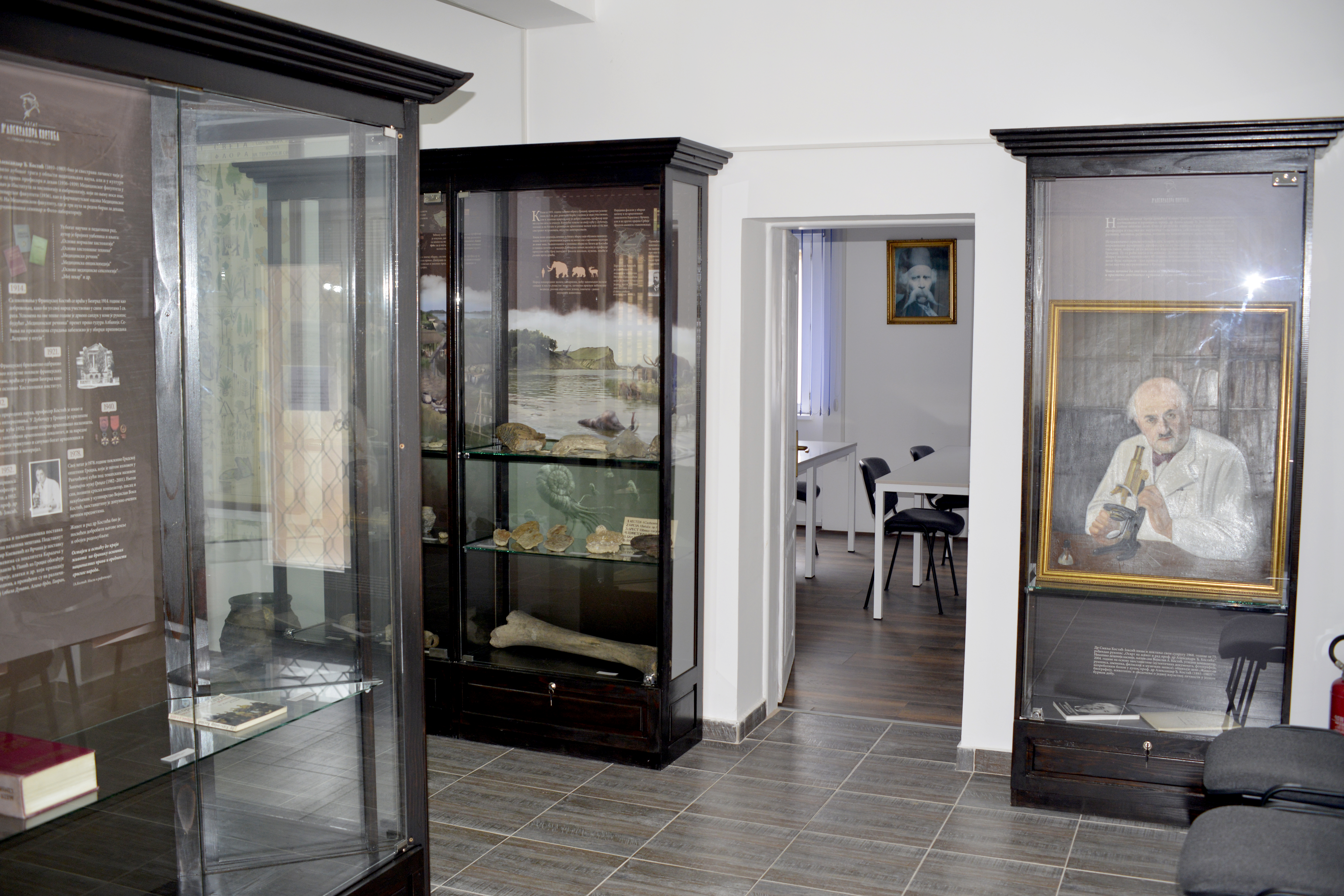 Biblioteka "Ilija Garašanin" u Grockoj - legat Aleksandra Kostića